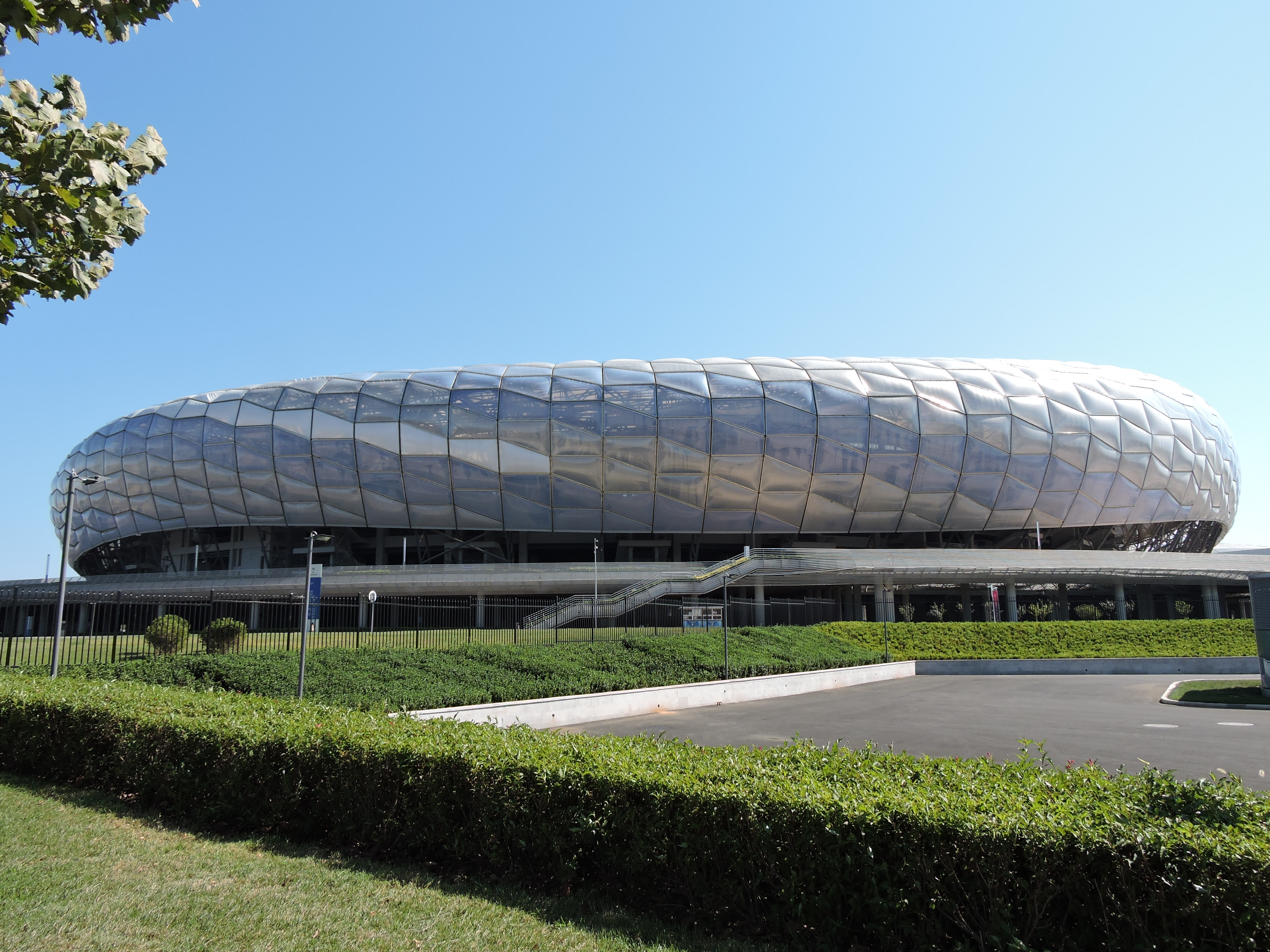 大连体育中心体育馆